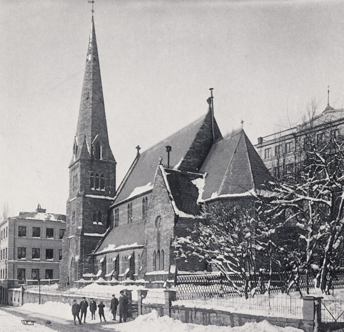 Engelska kyrkan i Stockholm på sin ursprungliga plats vid nuvarande Wallingatan